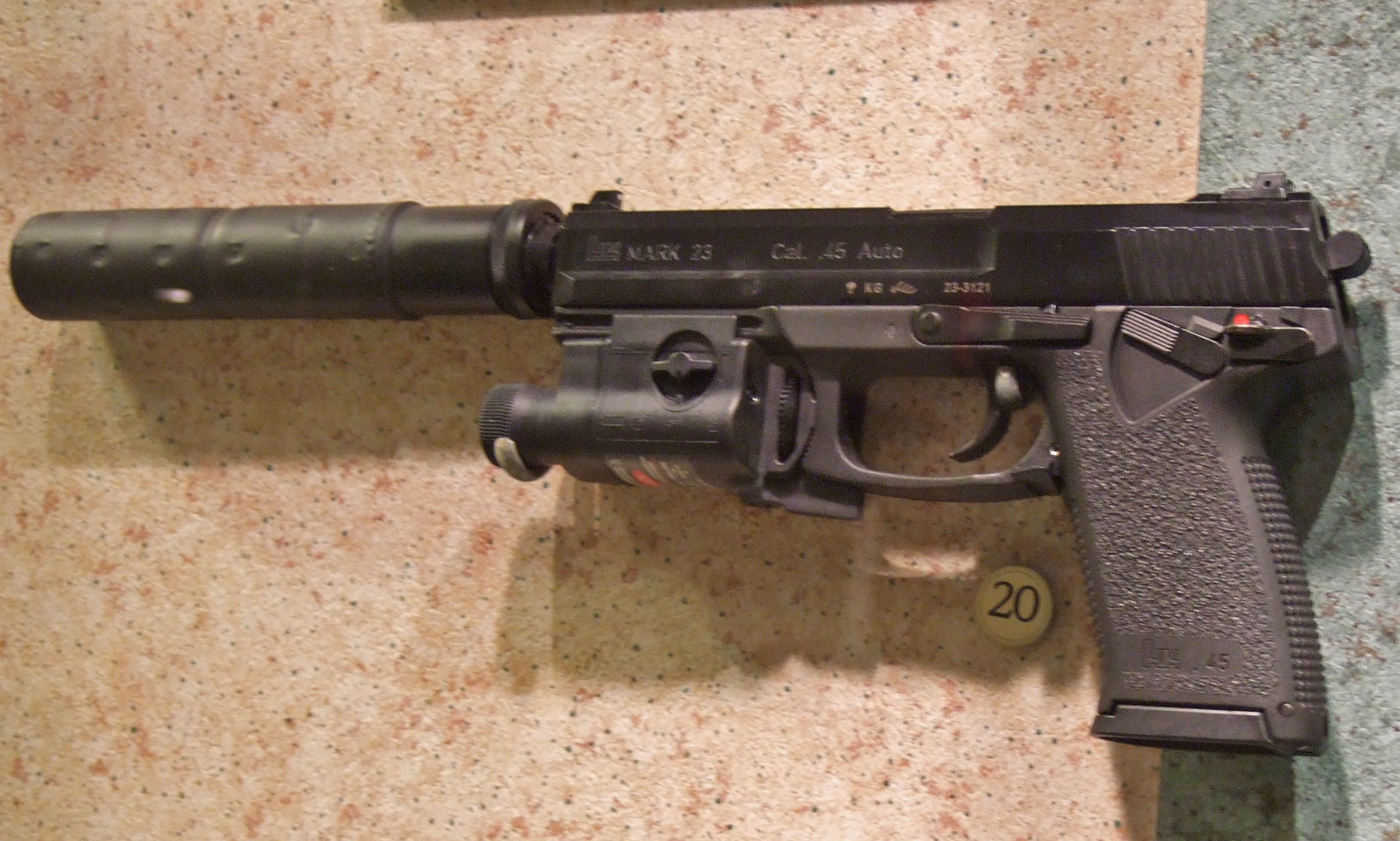 Heckler & Koch Mark 23 .45 cal SOCOM pistol.DSCF1083